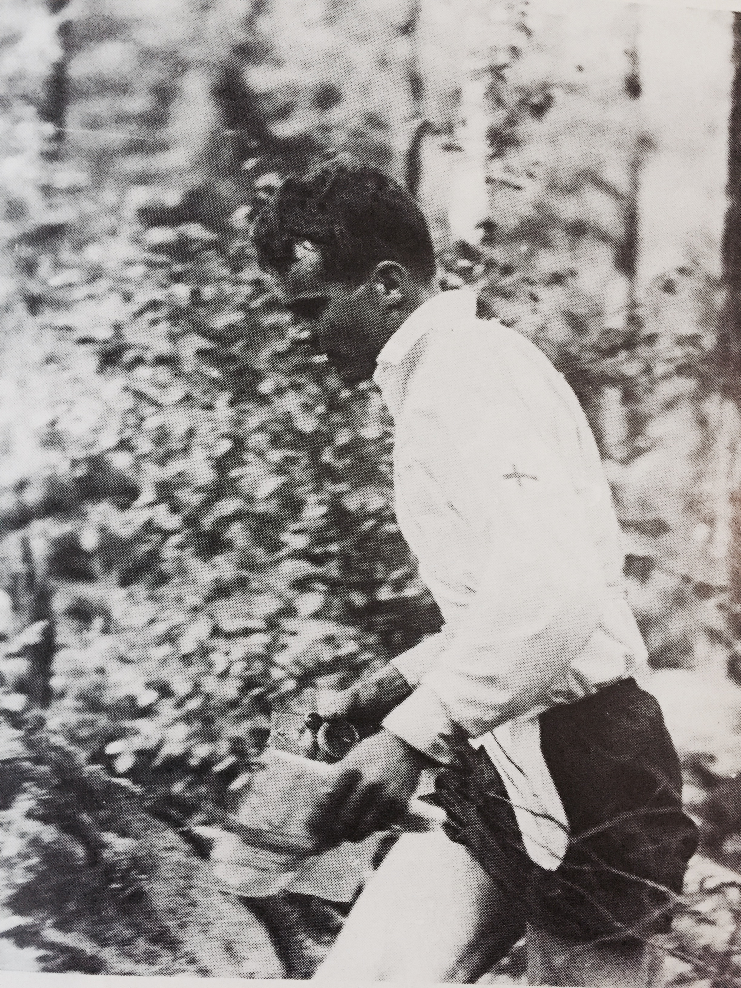 Raimo Nissi matkalla suunnistuksen viestin Pohjoismaiseen mestaruuteen Kemiössä v. 1969.